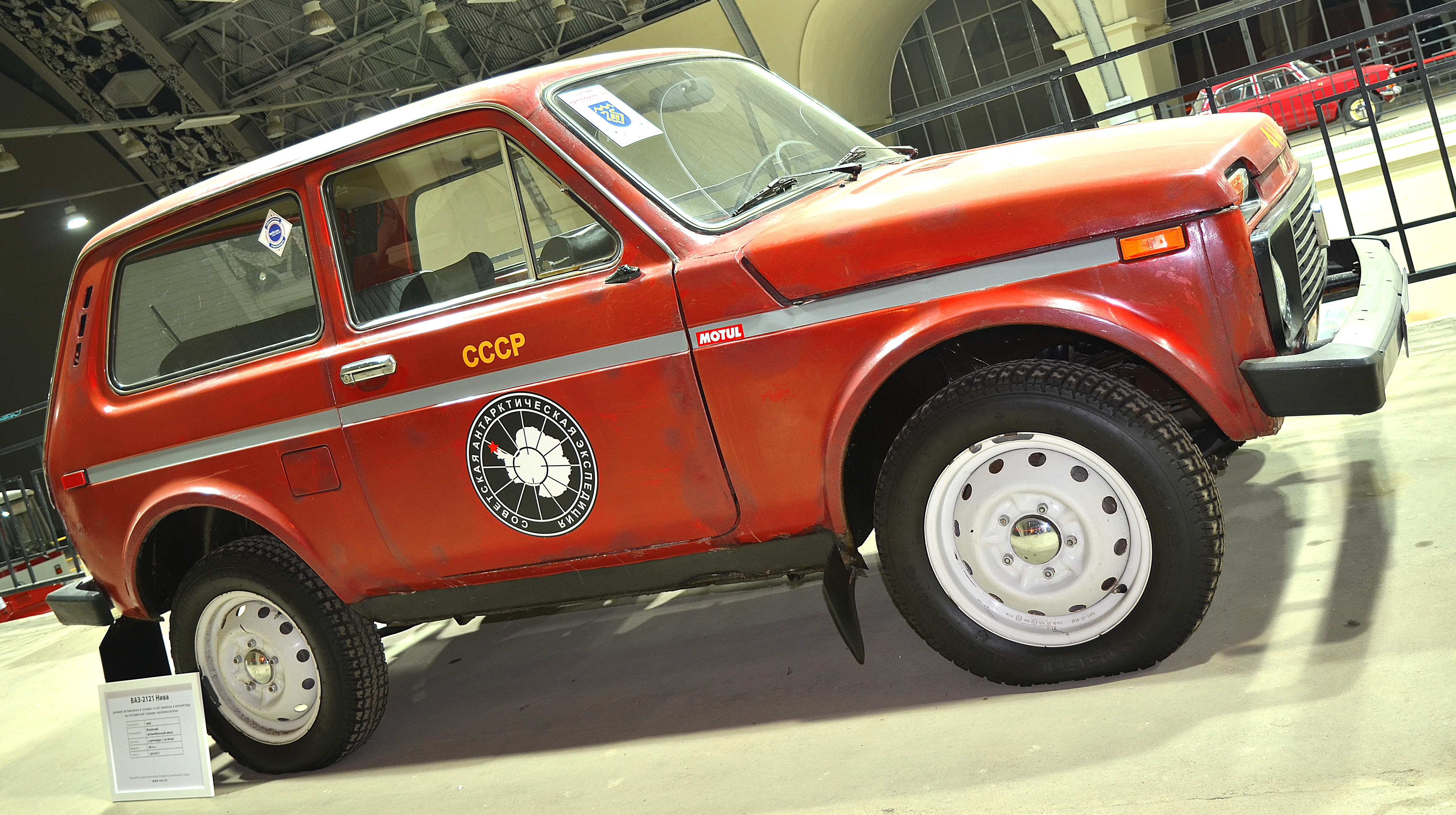 Можно увидеть здесь : You can see here